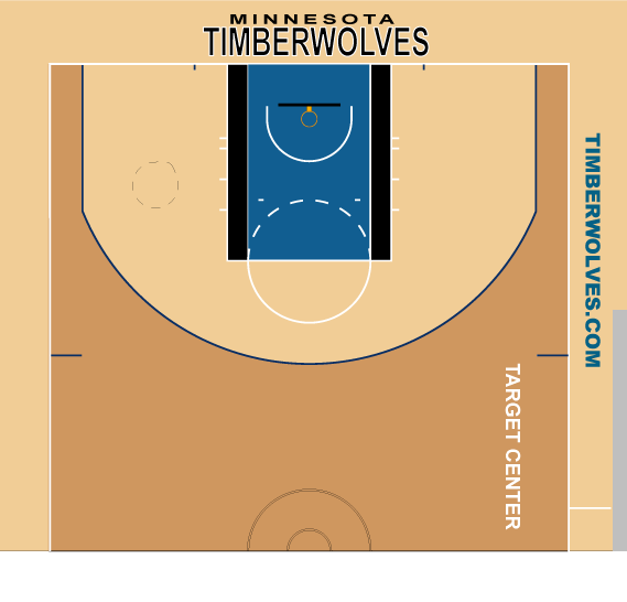 ウルヴスホームコート配色